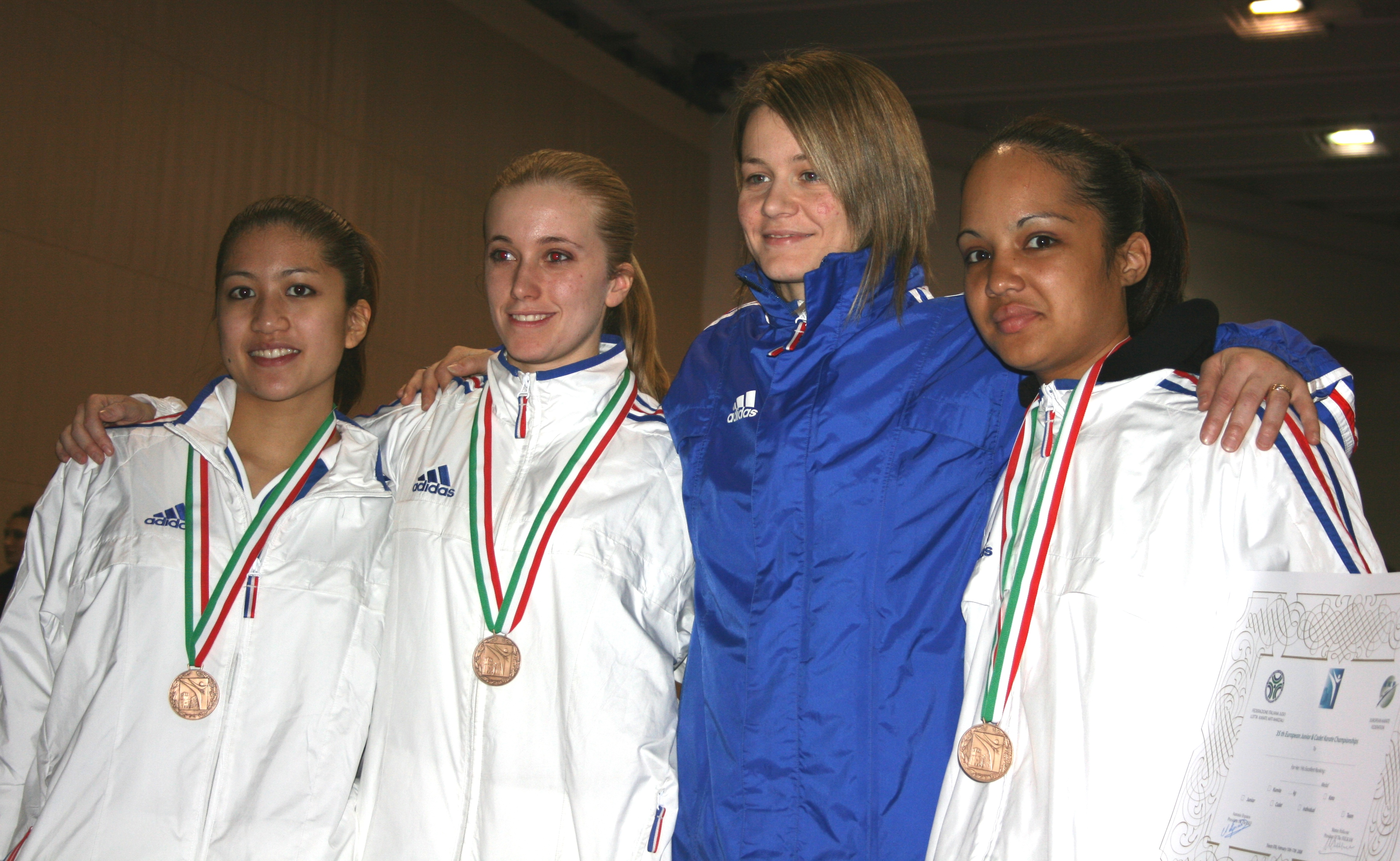 Jena Le, Clotilde Boulanger, Myriam Szkudlarek et Emmanuelle Fumonde aux championnats d'Europe de karaté juniors et cadets 2008, à Trieste, en Italie.